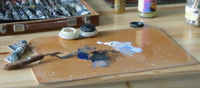 Palet, eigen foto, maart 2004, ter beschikking gesteld onder de GNU/FDL licentie